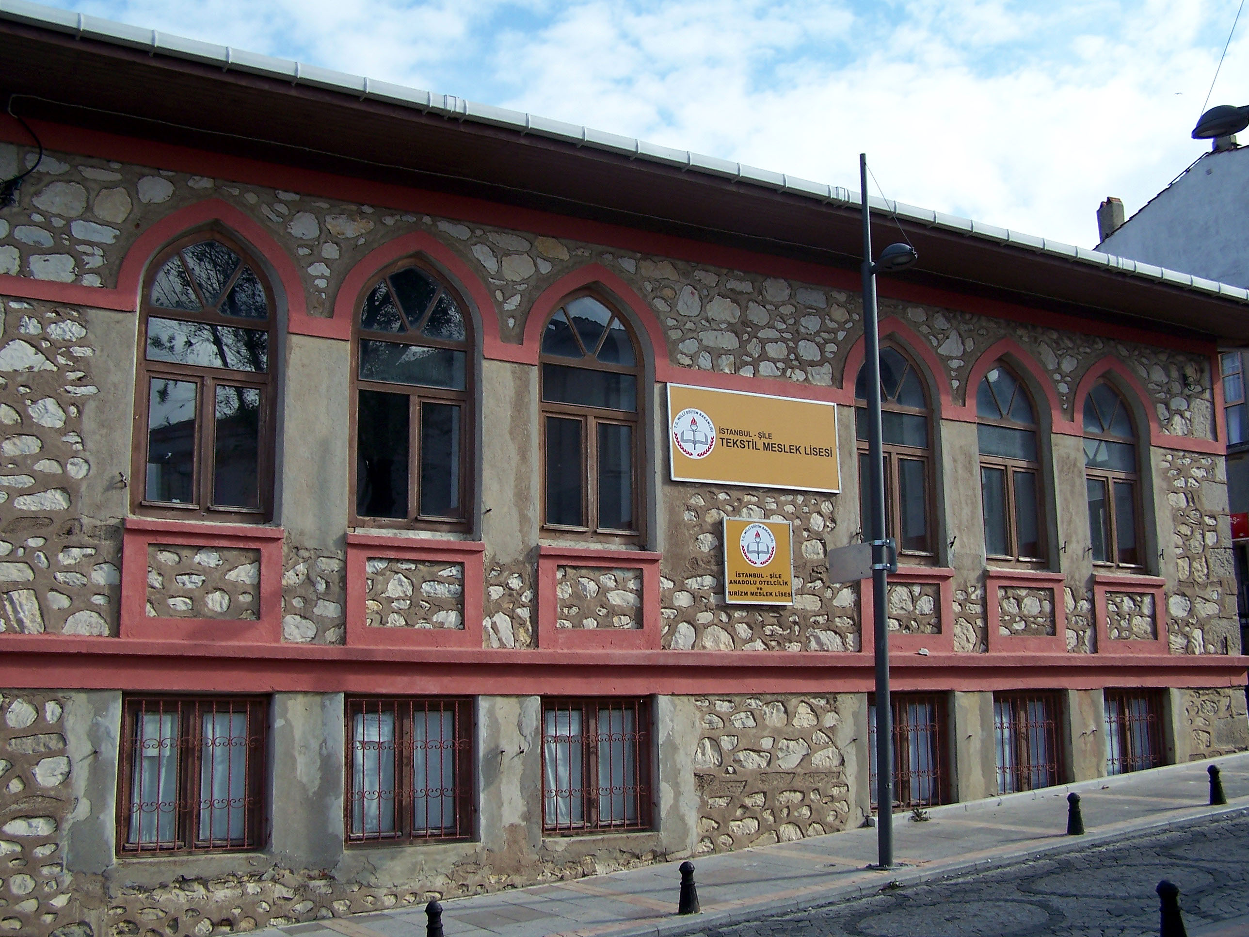 Tekstil Meslek Lisesi in Şile, Turkey